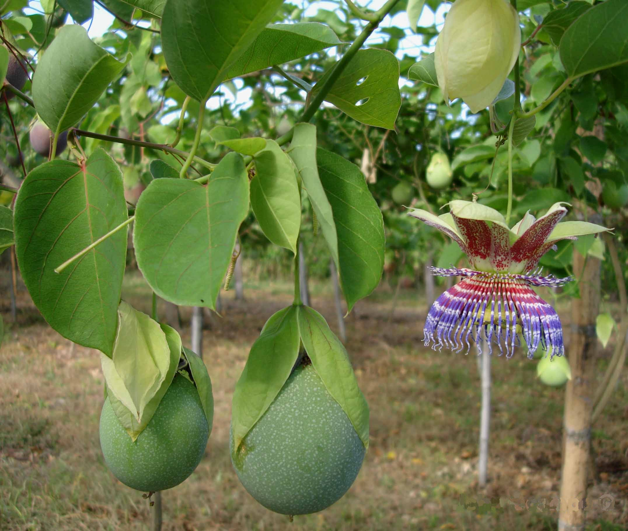 Especie cultivada en el deparatamento del Huila (Colombia)